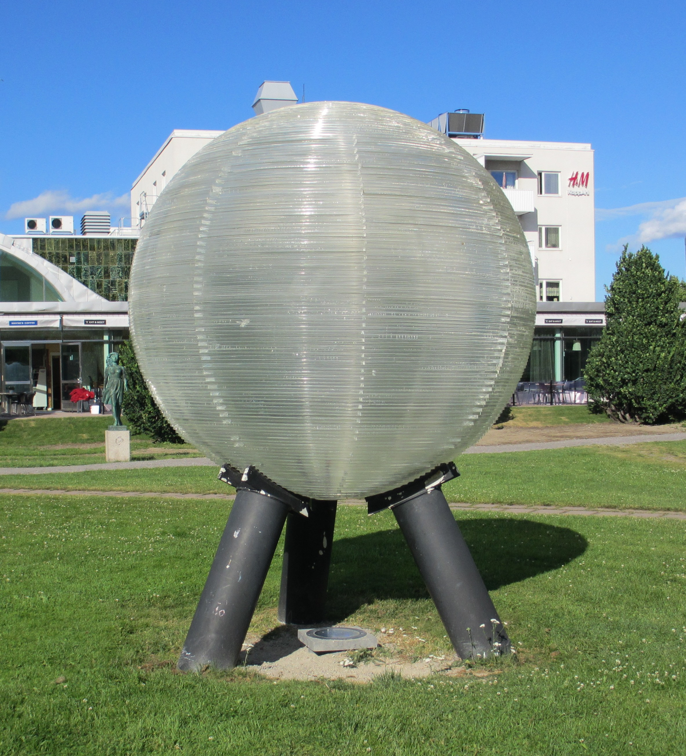 Neptunusskulptur i Strykjärnsparken Söderhamn